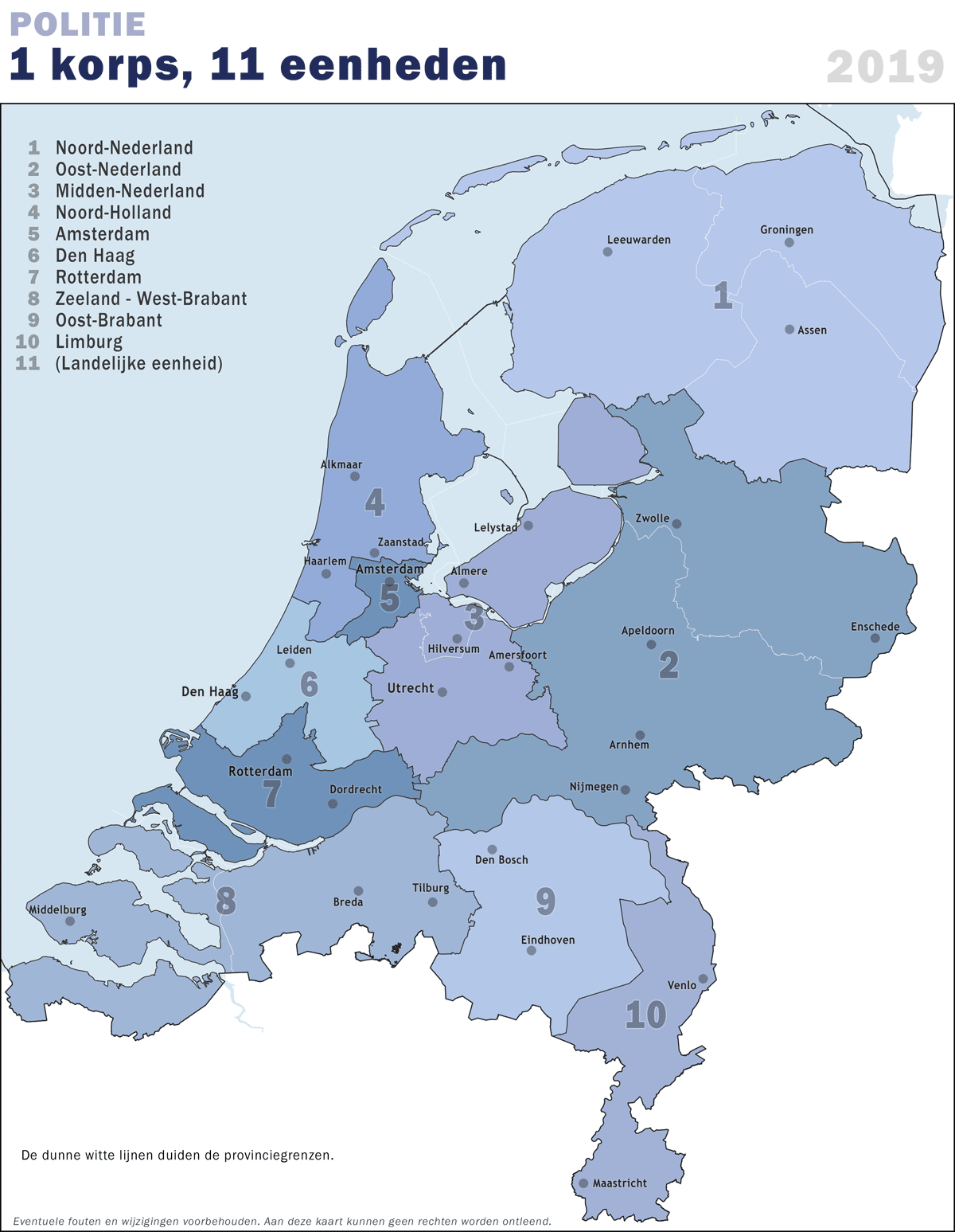 Overzichtskaart van de Politie-eenheden in Nederland per 2019, samengesteld door Jan-Willem van Aalst uit open geodata.